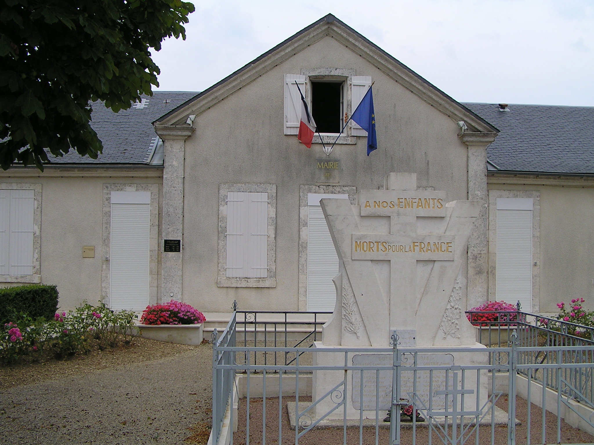 mairie d'Oradour d'Aigre